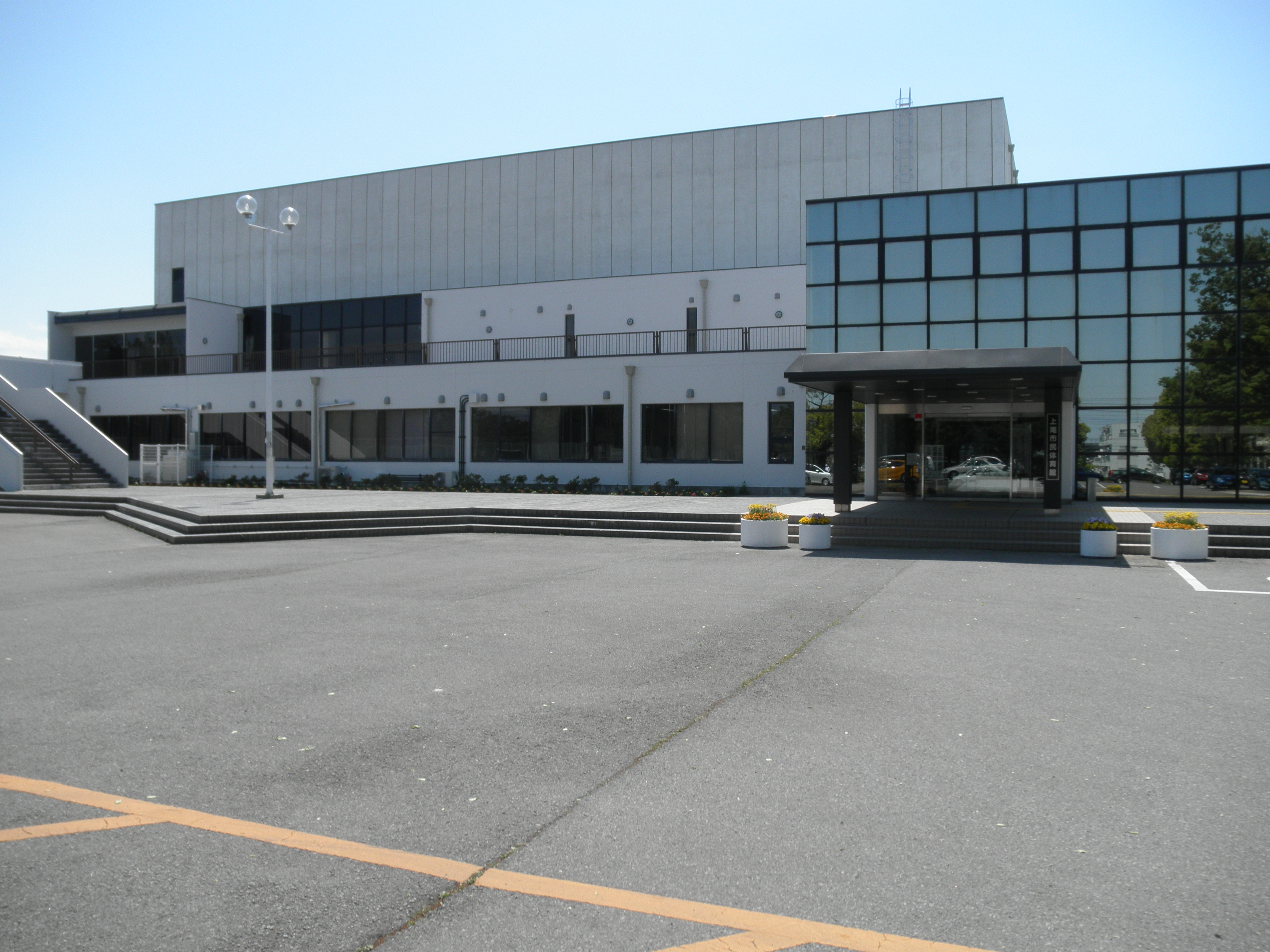 上尾市民体育館